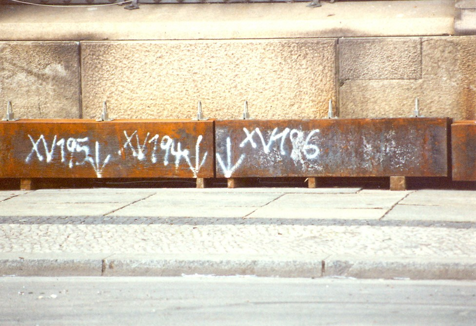 Beginn der Reichstagverhüllung